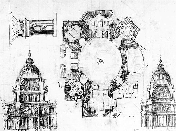 Le deuxième projet de François Mansart pour la chapelle des Bourbons à Saint-Denis.